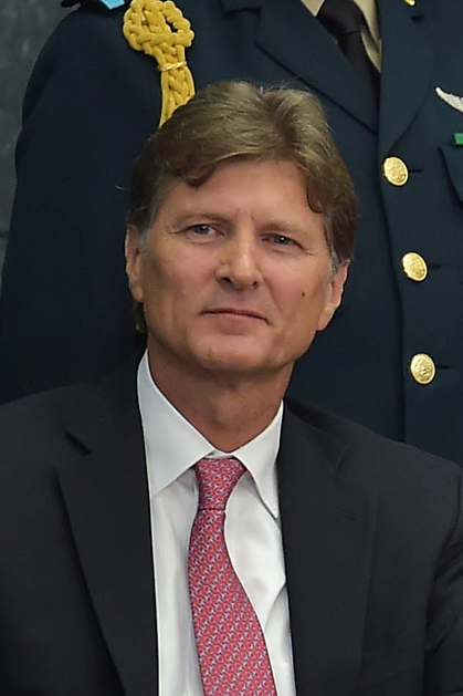 Enrique de la Madrid, Enrique Peña Nieto y José Ángel Gurría en la Presentación del Estudio de la Política Turística de México celebrado el 13 de enero de 2017.